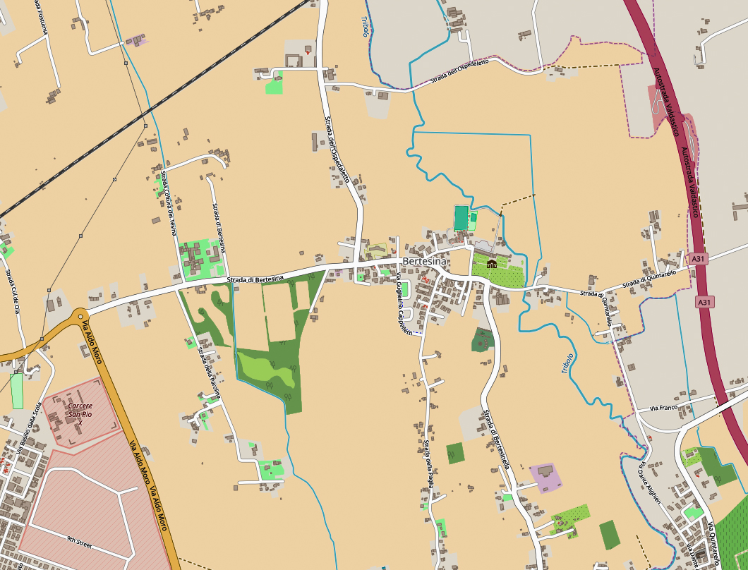 Mappa frazione Bertesina